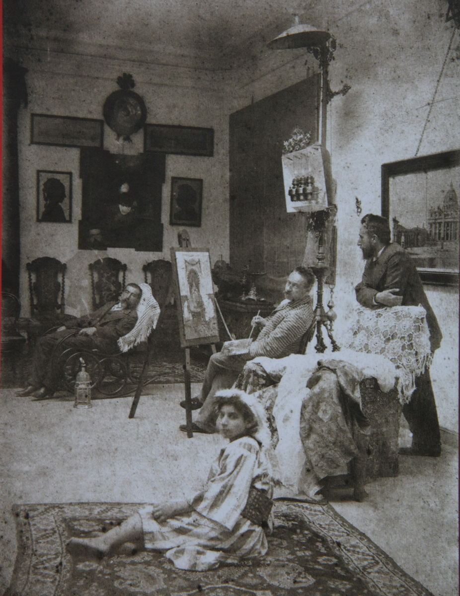 Taller de Josep Tapiró i Baró a Tànger.